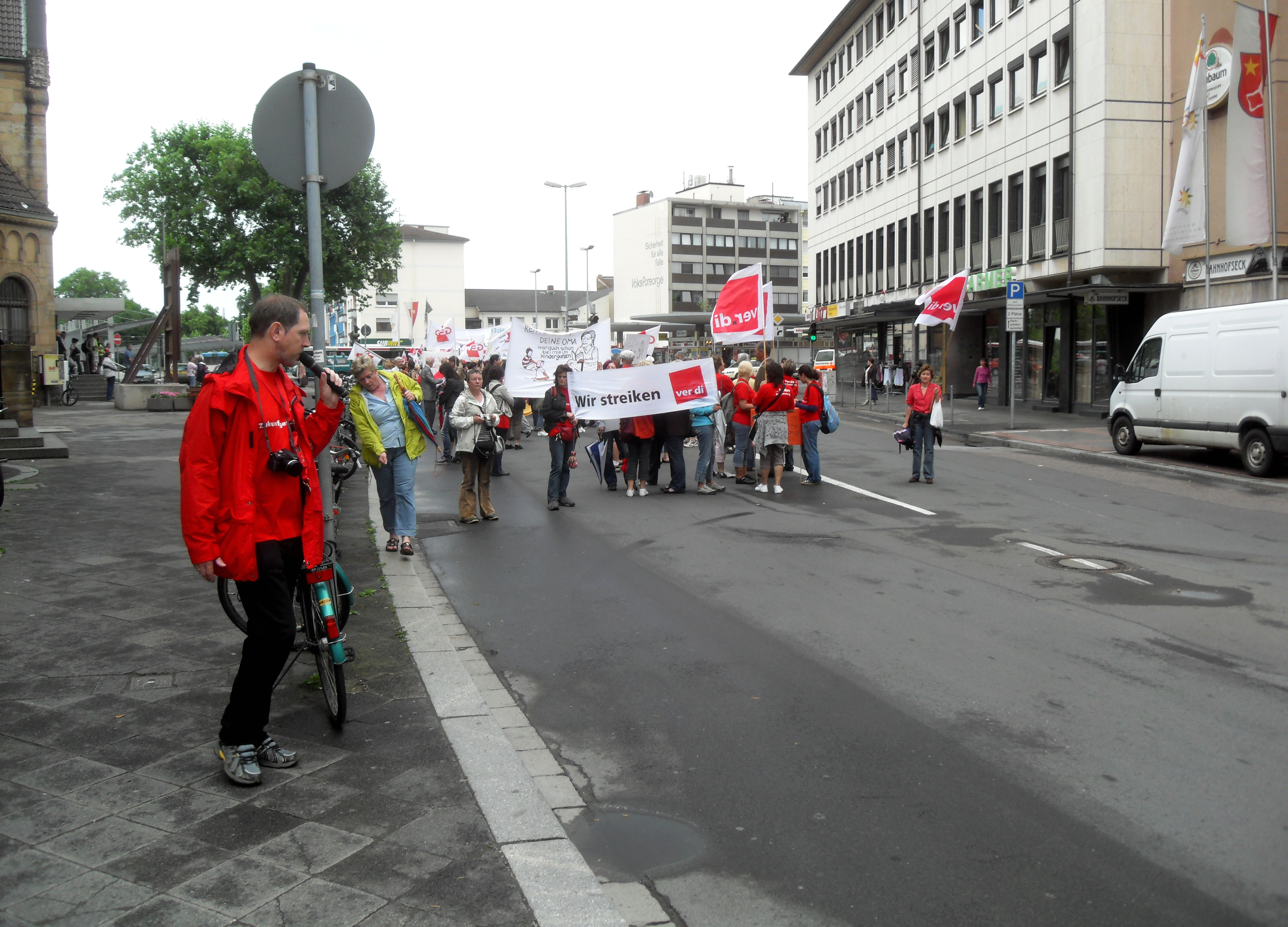 Kundgebung eines Streiks der Vereinten Dienstleistungsgewerkschaft in der Bahnhofstraße in Worms vor dem Wormser Hauptbahnhof